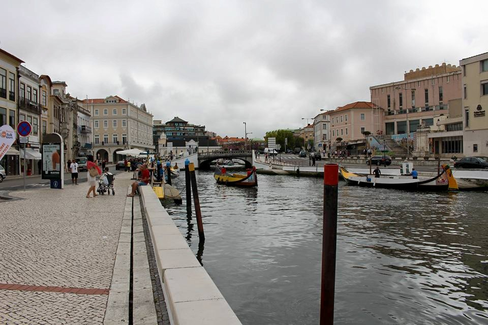 亞威羅市內的河岸